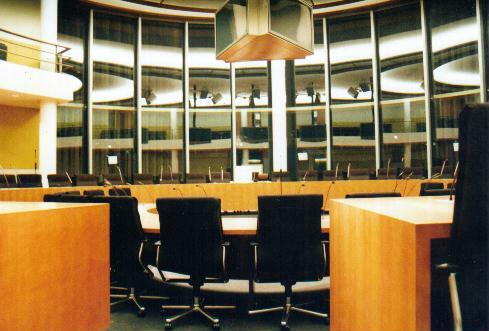 Raum eines Bundestagsausschusses im Paul-Löbe-Haus des Bundestages in Berlin, 2001.